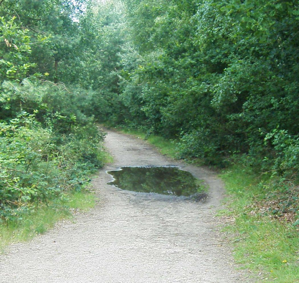 Pfütze auf einem Weg